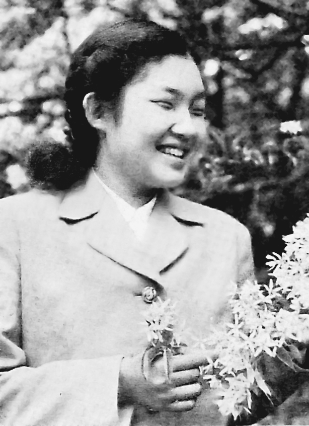 順宮厚子内親王